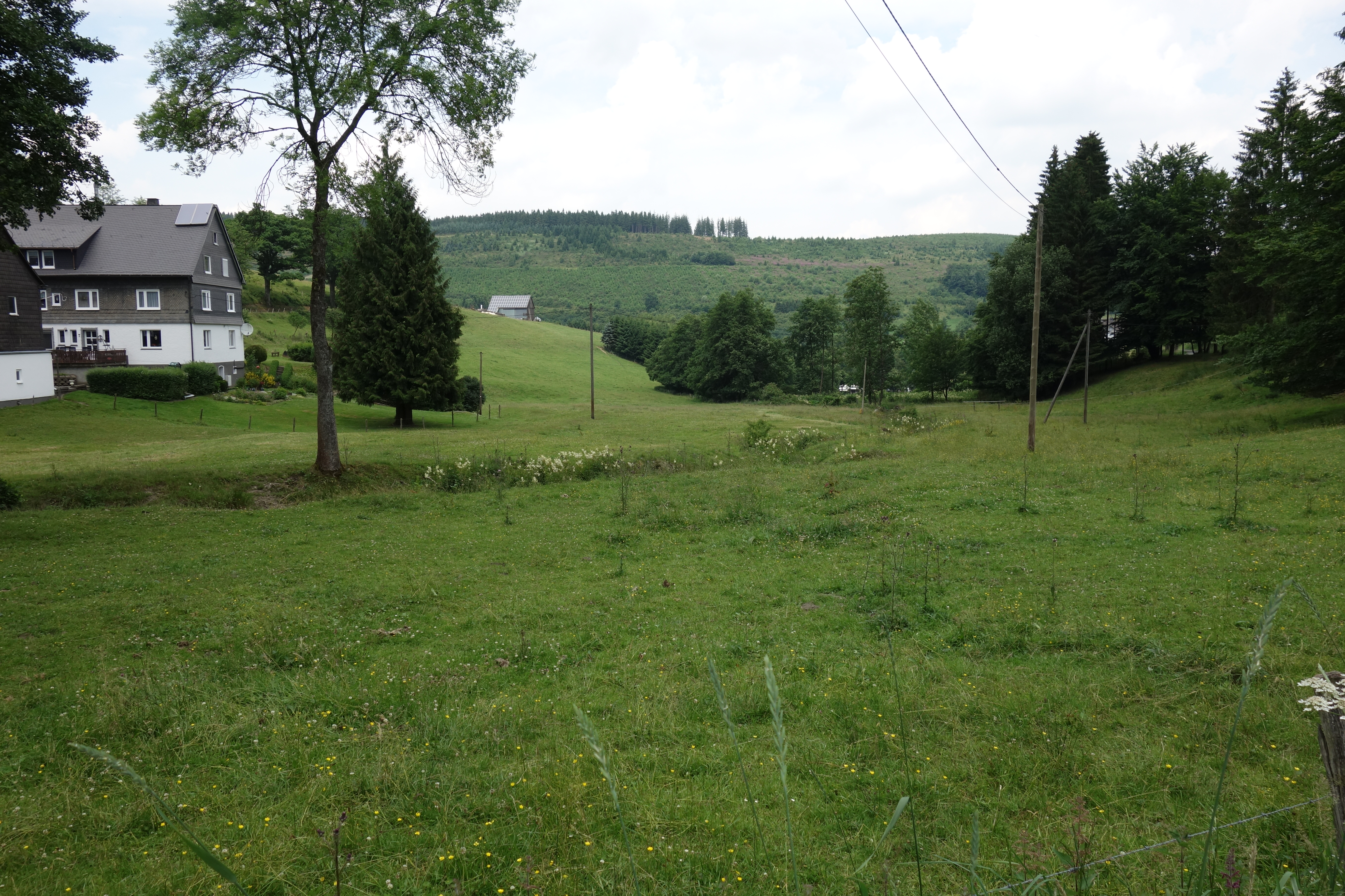 Grünland gehört zum Landschaftsschutzgebiet Brabecke und Gellinghauser Bach mit Seitentälern von nördlich Brabecke bis Osterwald und südlich Bödefeld, nördlich Osterwald. Wald auf Bergrücken im Hintergrund gehört zum Landschaftsschutzgebiet Schmallenberg Südost